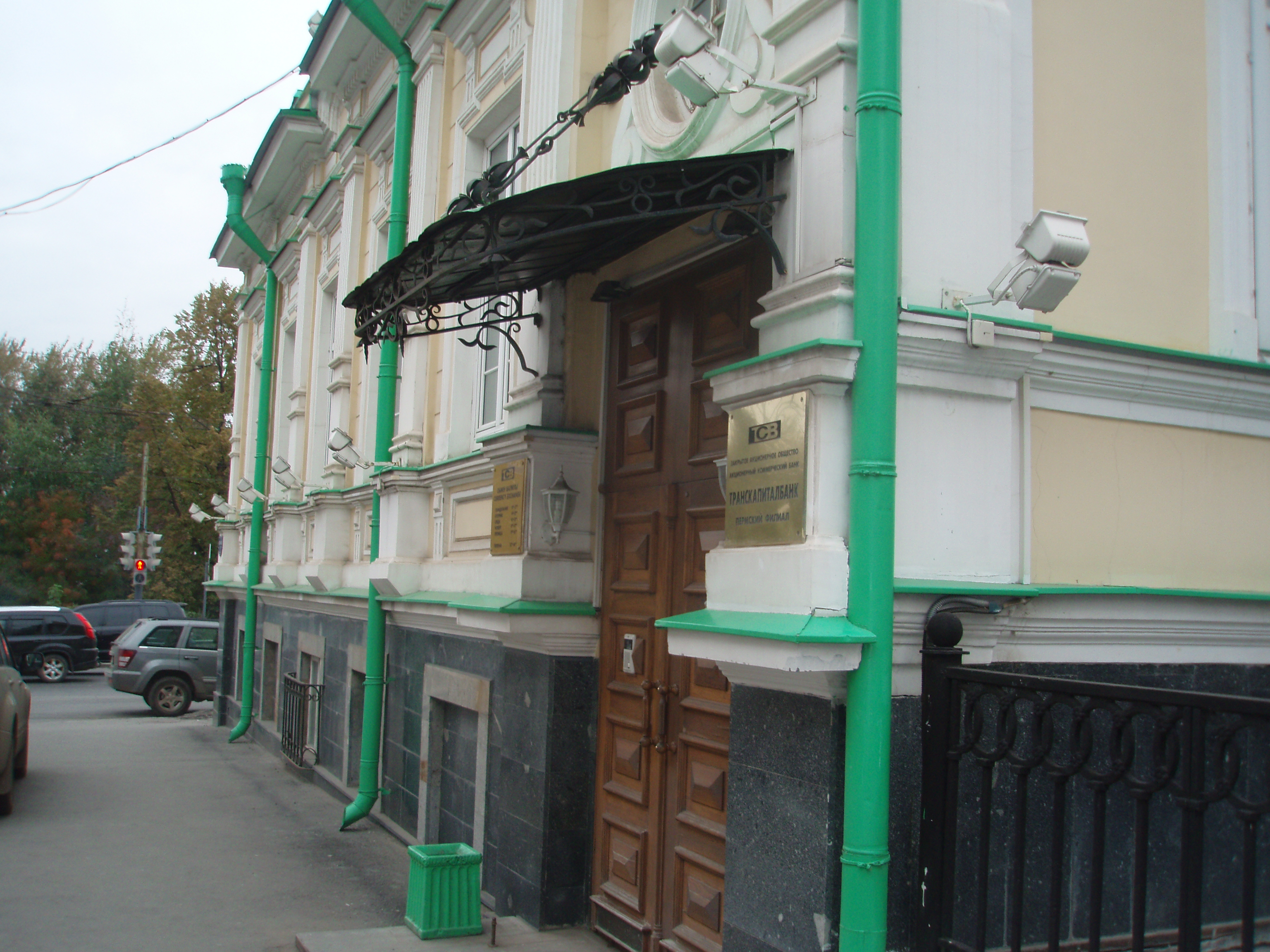 Дом председателя казенной палаты в Перми Вердеревского.